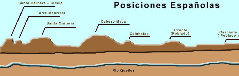 Esquema de las posiciones españolas en la Batalla de Tudela — 23 de noviembre de 1808. — Santa Bárbara: División Lapeña. Autor: User:Papix.